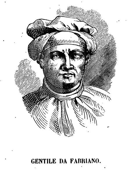 Schizzo di Giorgio Vasari raffigurante il volto di Gentile da Fabriano